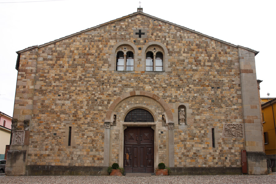 Facciata della chiesa dell'Assunzione di Maria Vergine, Fornovo di Taro